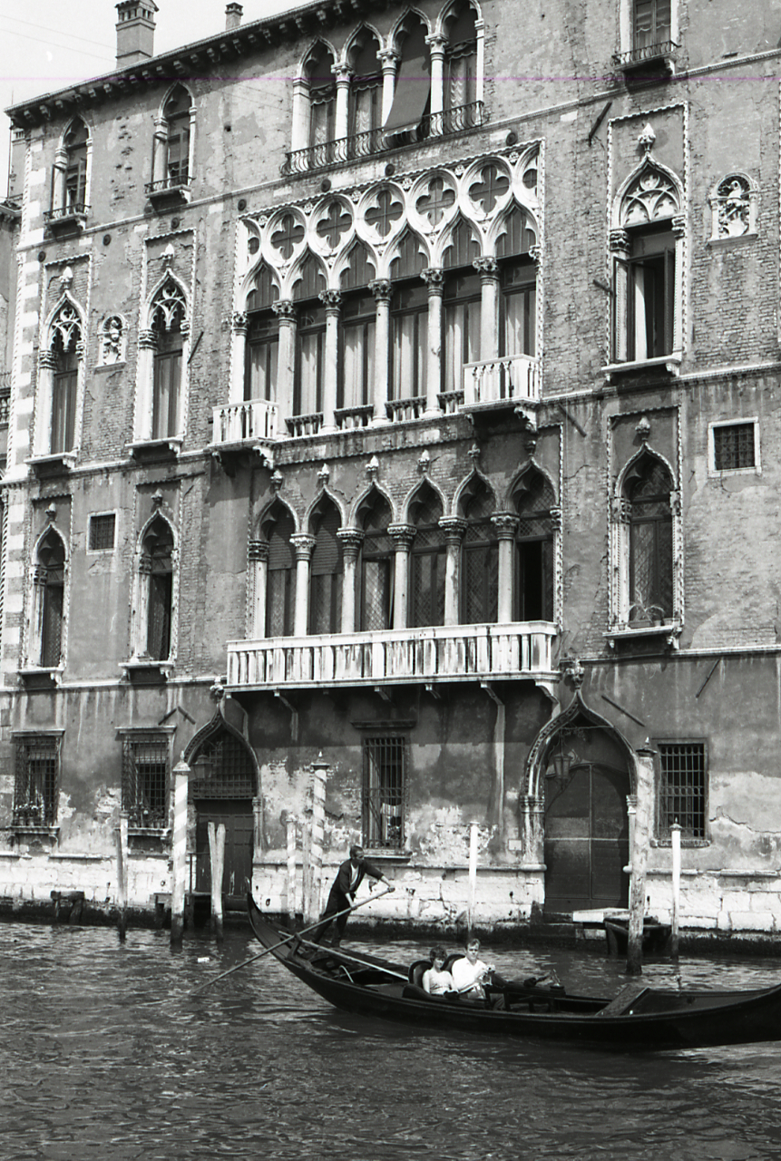 Servizio fotografico : Venezia, 1968 / Paolo Monti. - Strisce: 7, Fotogrammi complessivi: 36 : Negativo b/n, gelatina bromuro d'argento/ pellicola ; 35 mm. - ((I fotogrammi hanno una doppia numerazione. . - Sul portanegativi: Nikon Agfa 21. - Sul dorso del portanegativi Monti specifica: "Gondole". - Probabilmente questa specifica in penna biro rossa si riferisce a ricerche personali che esulano dal contesto del servizio commissionato da Electa. - Occasione: Pubblicazione: "Edoardo ARSLAN, Venezia gotica: architettura civile gotica veneziana, Milano, Electa, 1970". - Fonte: Agenda di Paolo Monti: Venezia Architettura Gotica Civile / Ed. Electa maggio/giugno 1968 (1968/05-1968/06), presso Archivio Paolo Monti